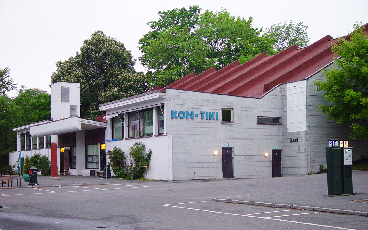 Kon Tiki Mueseet på Bygdøy i Oslo